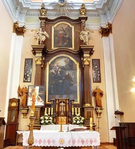 Biała Podlaska, kościół p.w. św. Antoniego, poł. XVII